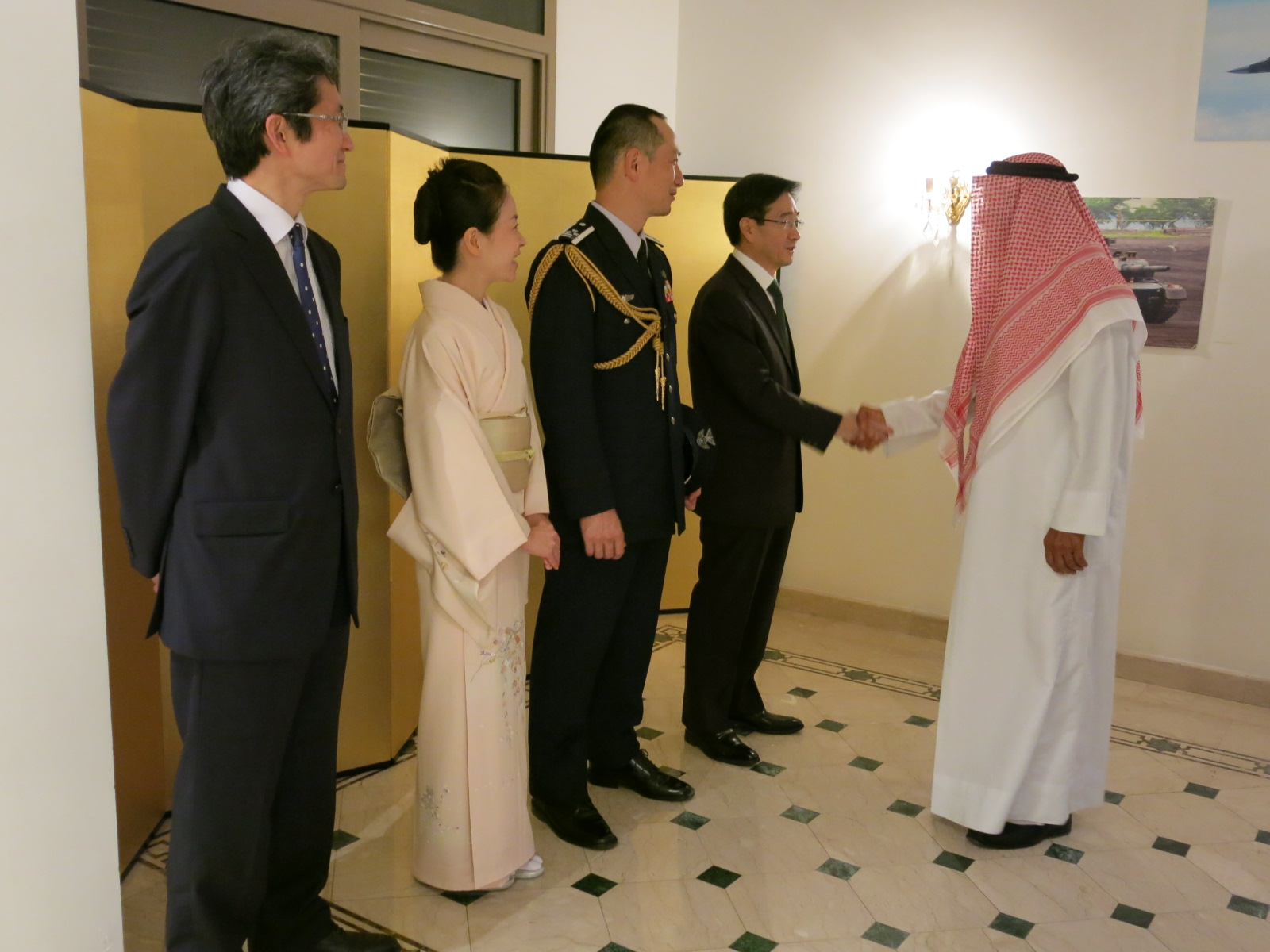 在クウェート日本大使館は、大使公邸において、クウェート国防省・参謀本部関係者及び当地駐在武官等の参加を得て、平成２７年度自衛隊記念日レセプションを開催しました。